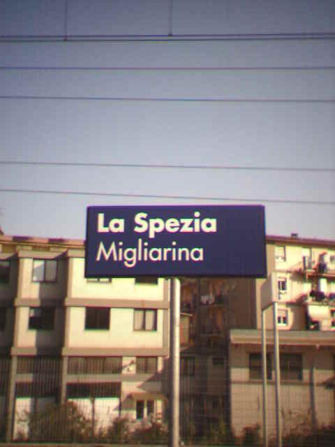 Stazione Ferroviaria La Spezia Migliarina- La Spezia - Italia